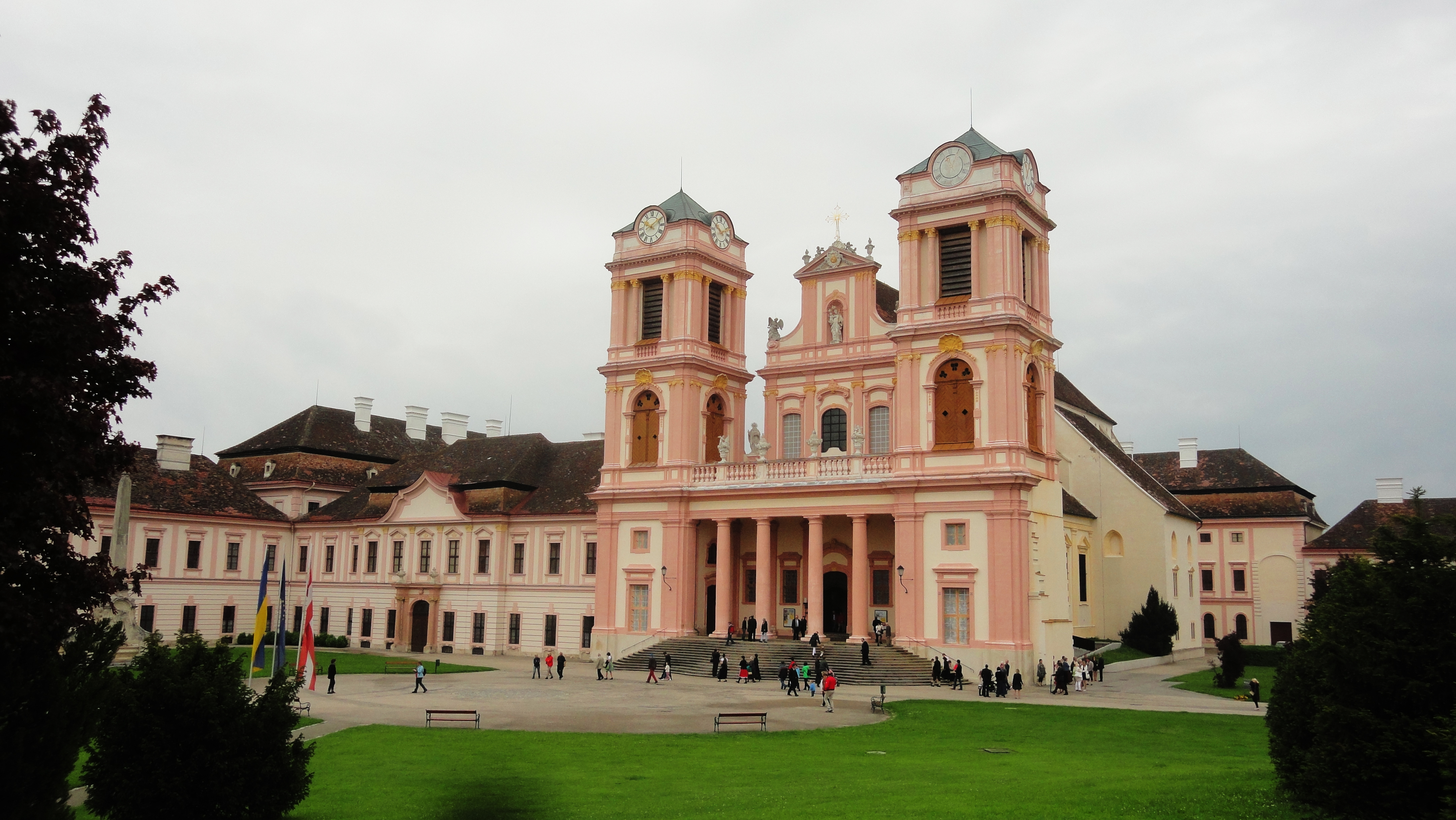 Stift Göttweig mit Eingang zur Stiftskirche.